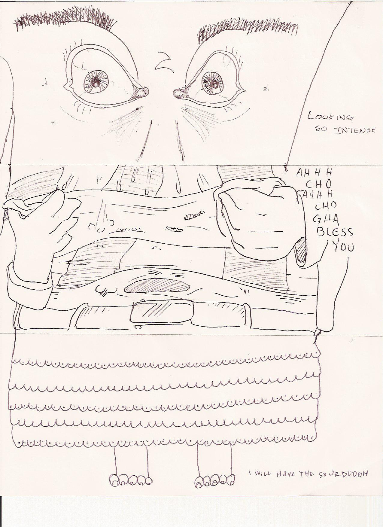 Ejemplo de cadáver exquisito gráfico An Exquisite Corpse game drawing